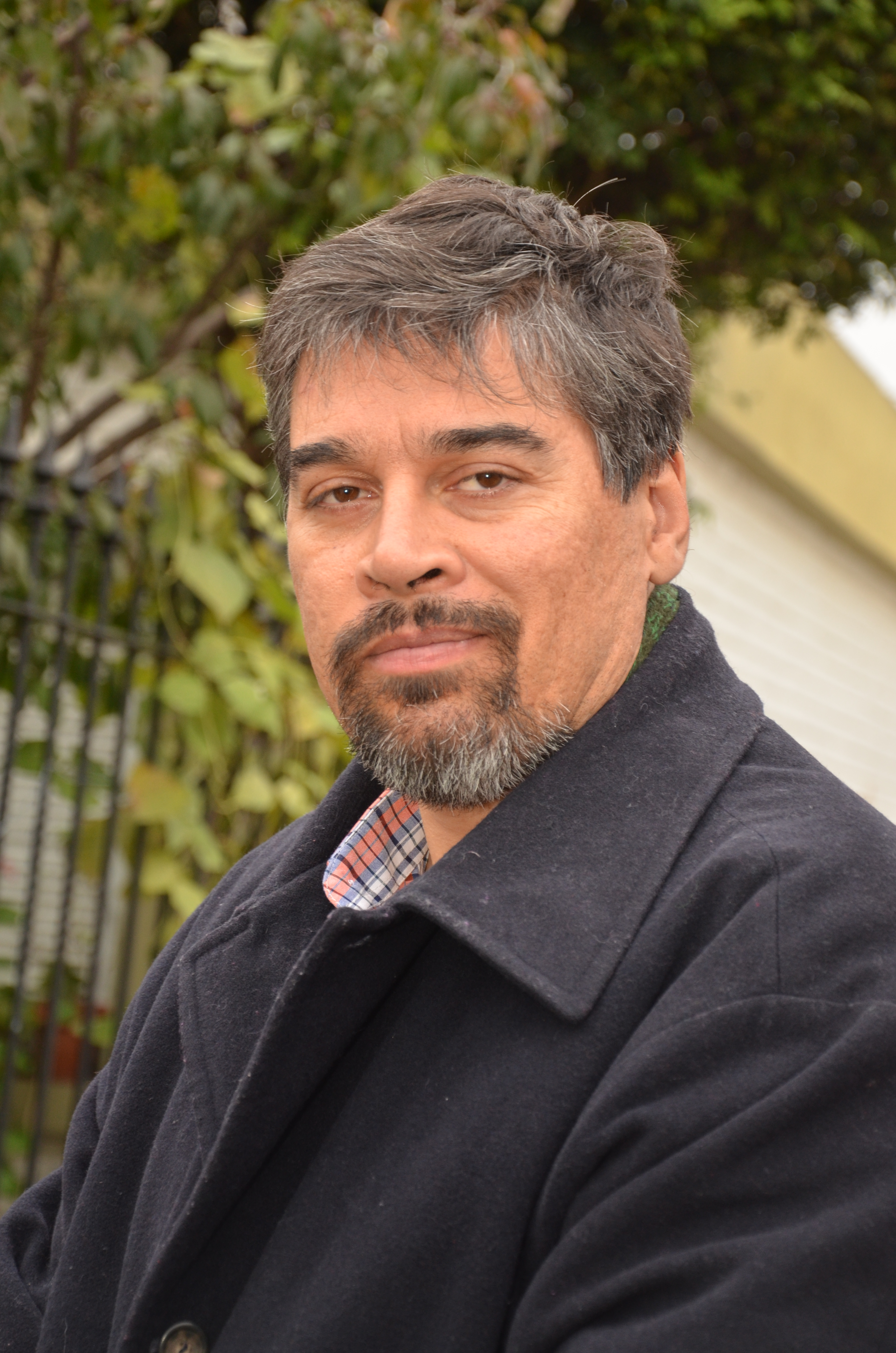 El filósofo argentino Guillermo Lariguet.